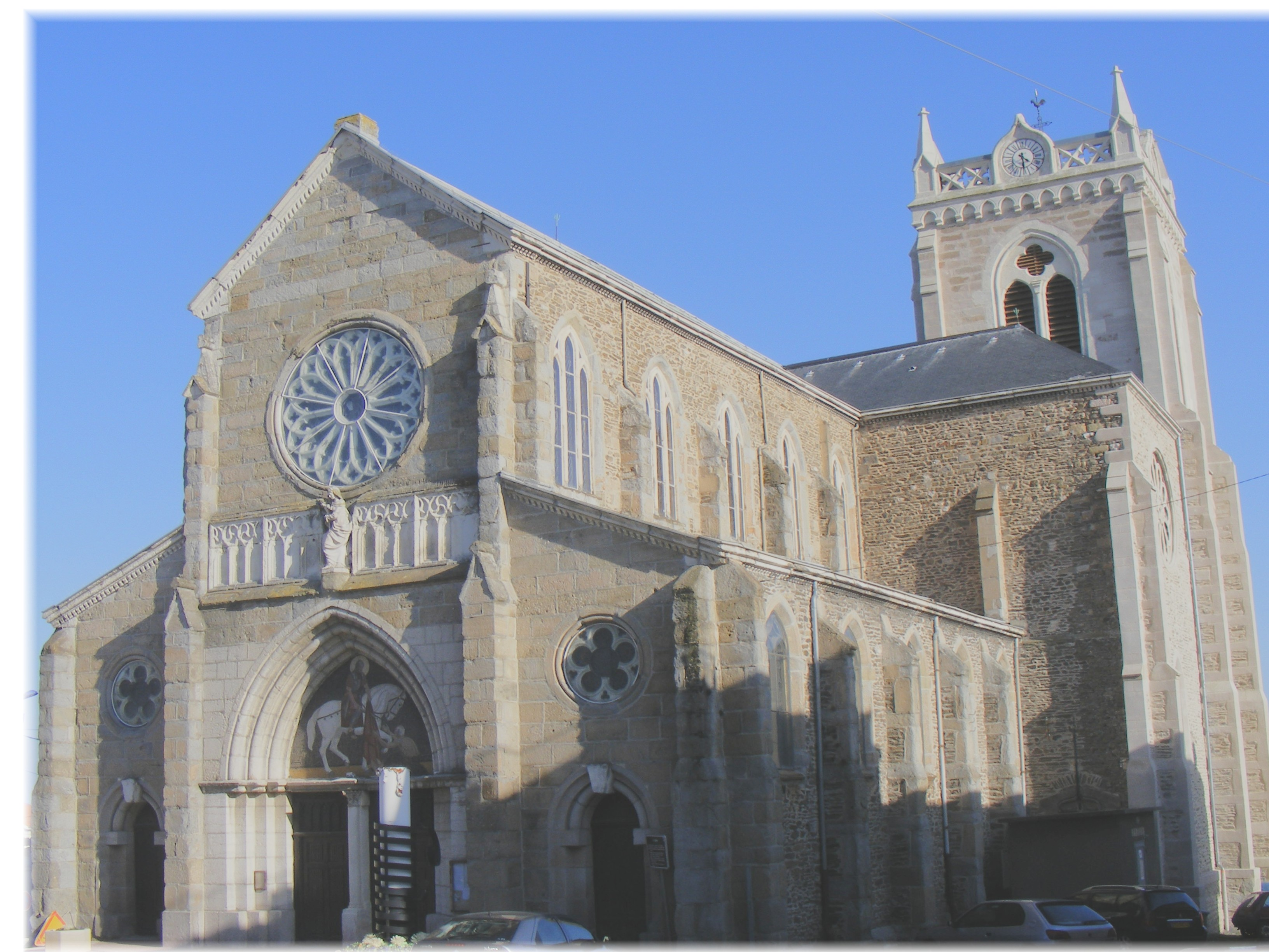 église construite entre 1854 et 1857 / architecture néogothique